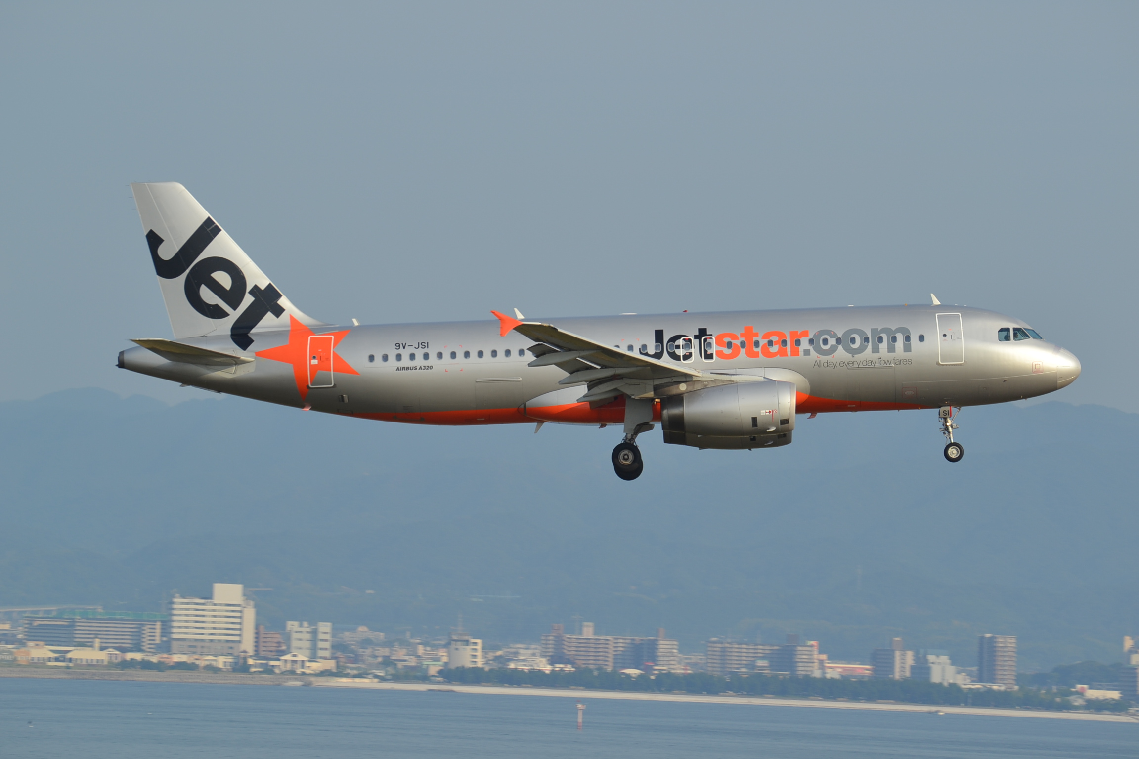 Airbus A320 of Jetstar Asia at Osaka Kansai-KIX,Japan,28/08/13.